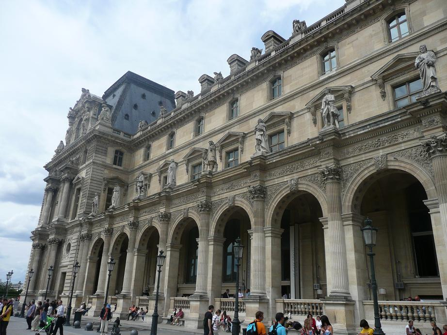 Statues en pied, pierre, décor sculpté de la faccade de l'Aile Turgot (entre les Pavillons Turgot et Richelieu), Cour Napoléon du Palais du Louvre, Ier arrondissement Paris. Statues en pied, pierre, de gauche à droite: 1. Jean Esprit Marcellin (Français, 1821-1884): Grégoire de Tours 2. Louis Elias Robert: Rabelais 3. Jean Jules Allasseur (Français, 1818-1903): Malherbe 4. Pierre Jules Cavelier (Français, 1814-1894) : Abélard 5. Paul Gayrard (Français, 1807-1855): Colbert 6. Pierre Hébert, aîné (Français, 1804-1869): Mazarin 7. Eugène André Oudiné (Français, 1810-1887): Buffon 8. Philippe Lemaire (Français, 1798-1880): Froissart 9. Eugène (?) Farochon: Rousseau 10. Nanteuil: Montesquieu (cette dernière statue non visible sur cette photographie.